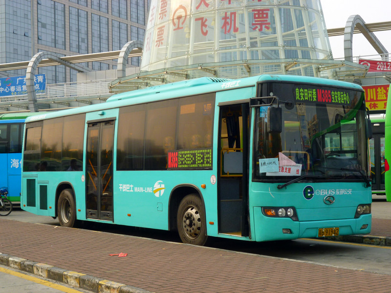 中文（中国大陆）: 深圳公交M385路的海格KLQ6108GE3